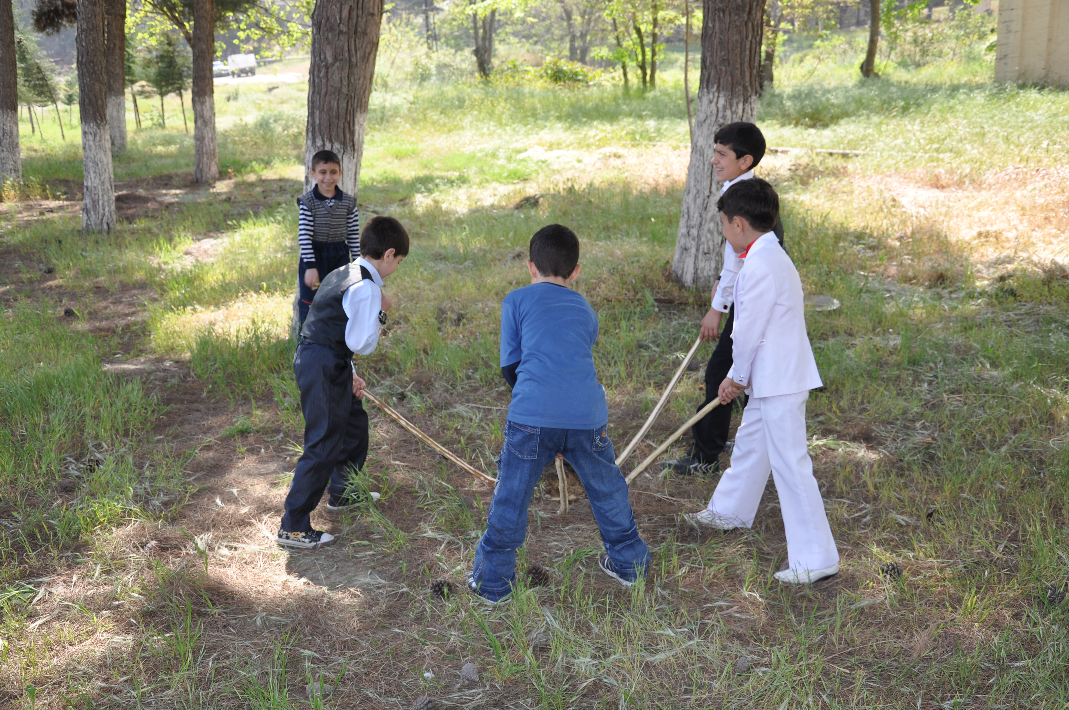 Mətə-mətə — Azərbaycanda ən çox yazqabağı (bayramqabağı) günlərdə, eləcə də digər fəsillərdə əsasən uşaq və gənclər arasında, geniş şəkildə oynanılan qədim oyunlarından biridir.